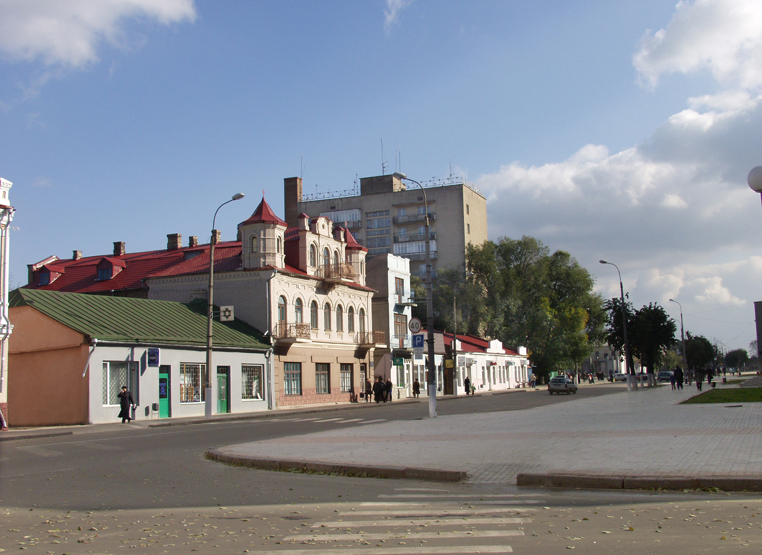 Дворовий корпус (мур.), Ковель, вул. Незалежності, 122